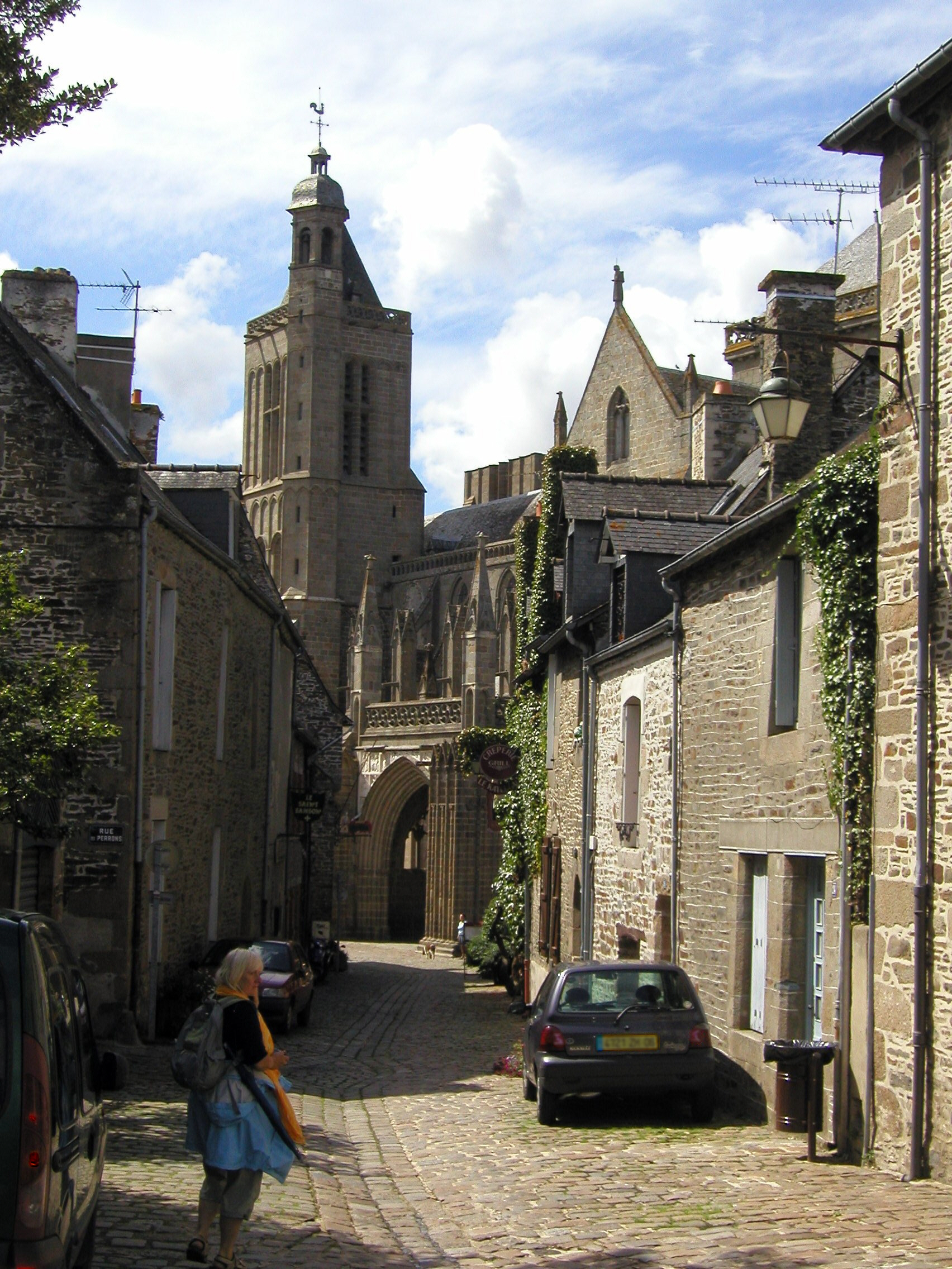 Altstadtgasse in Dol-de-Bretagne mit Saint-Samson im Hintergrund